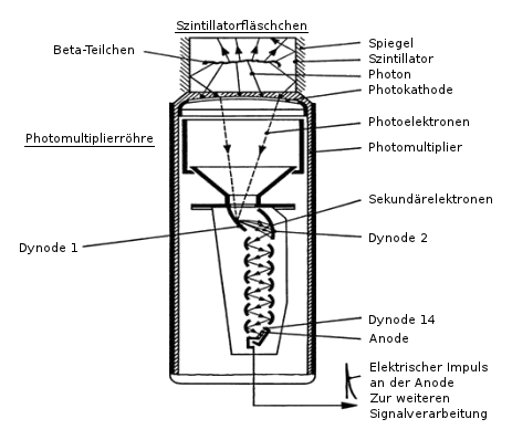 Photomultiplier